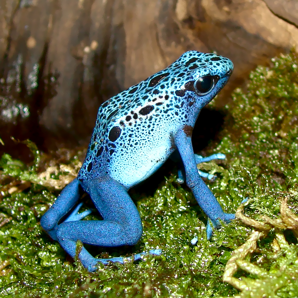 Dendrobates azureus